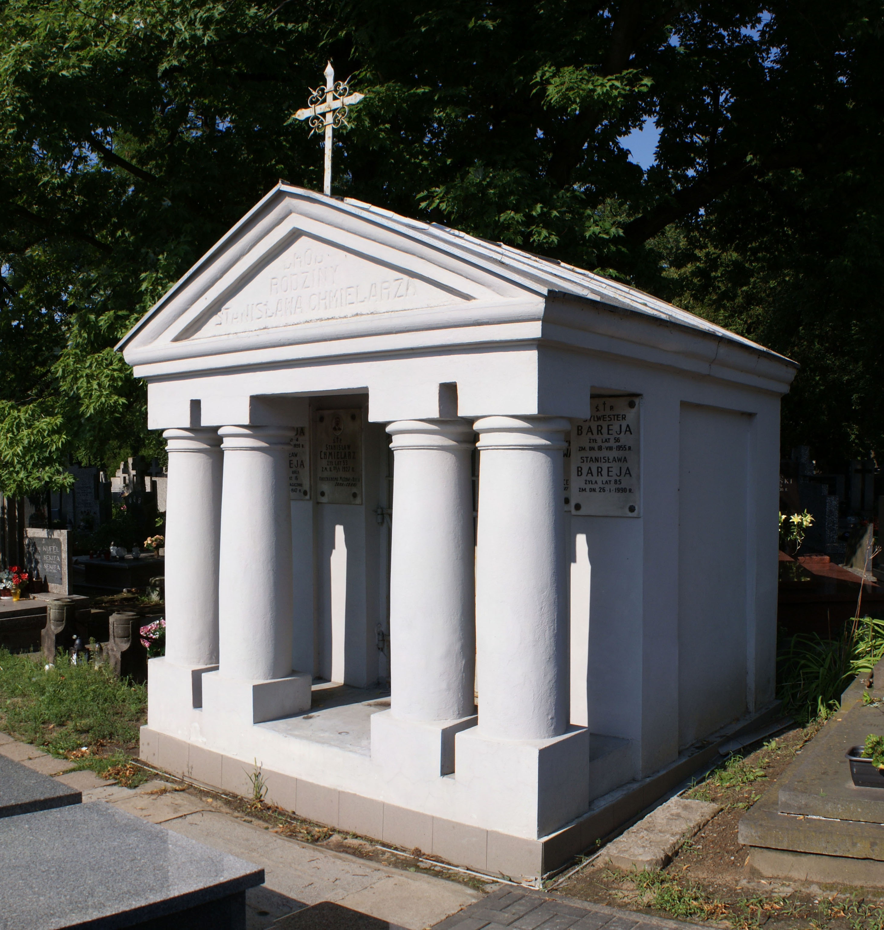 Mauzoleum rodziny Stanisława Chmielarza i Barejów na cmentarzu Czerniakowskim w Warszawie